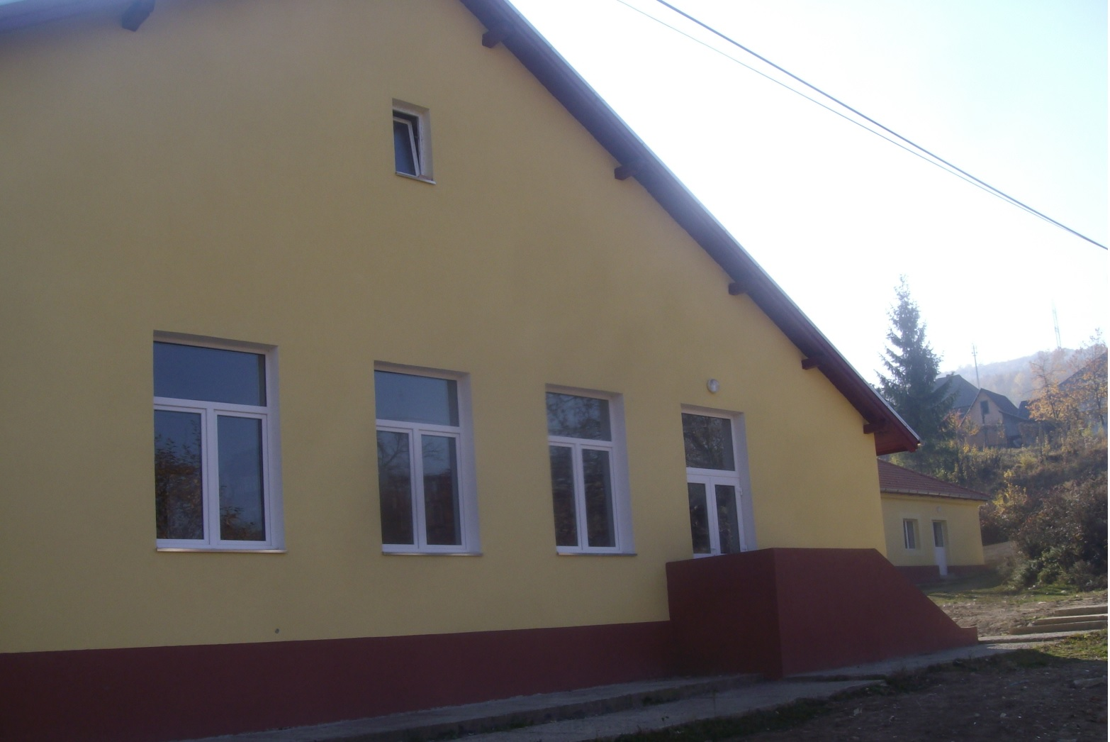 Fatada biblioteca Nucet